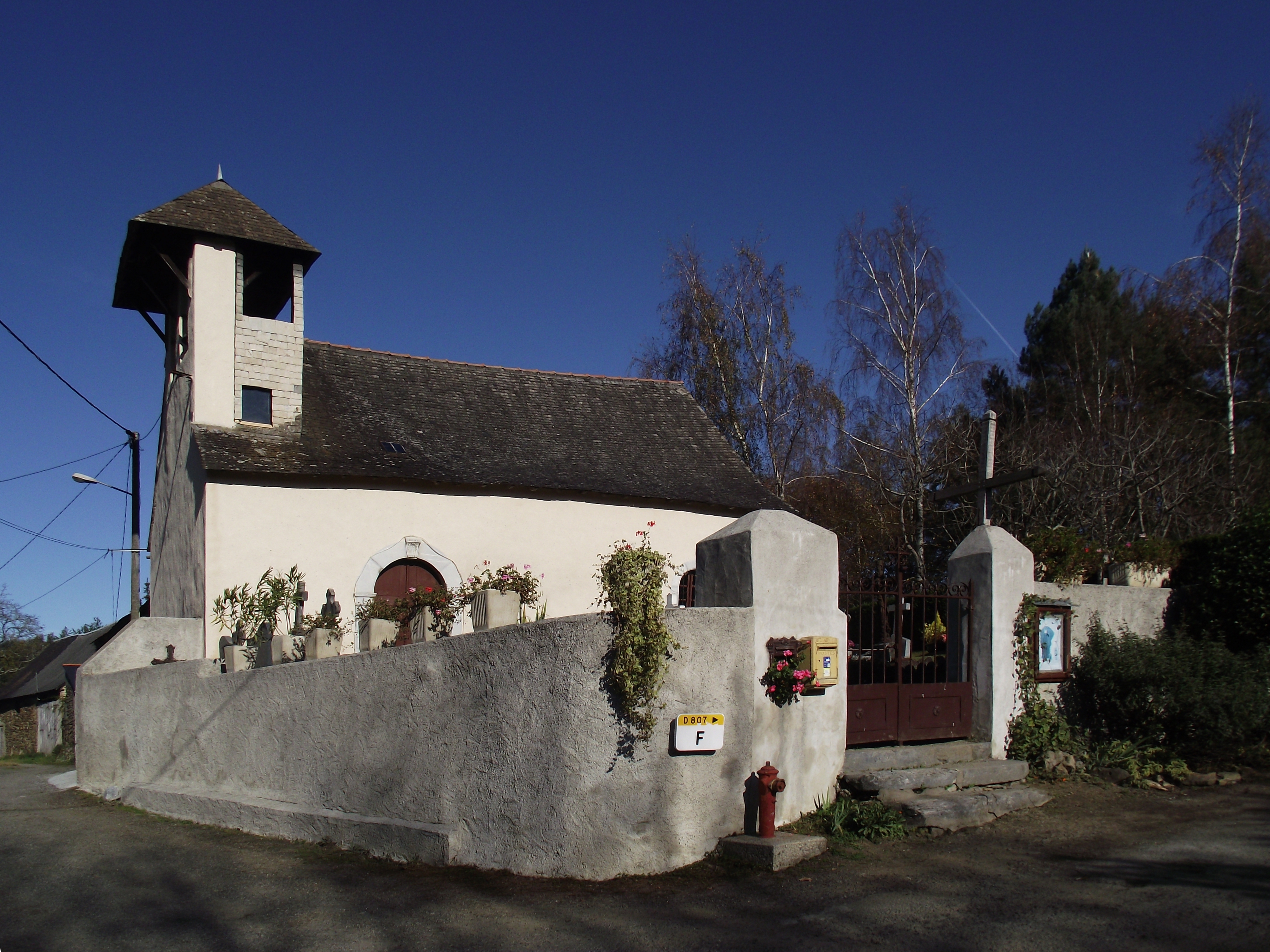 Église Saint-Martin d'Arrayou (Arrayou-Lahitte, Hautes-Pyrénées, France)